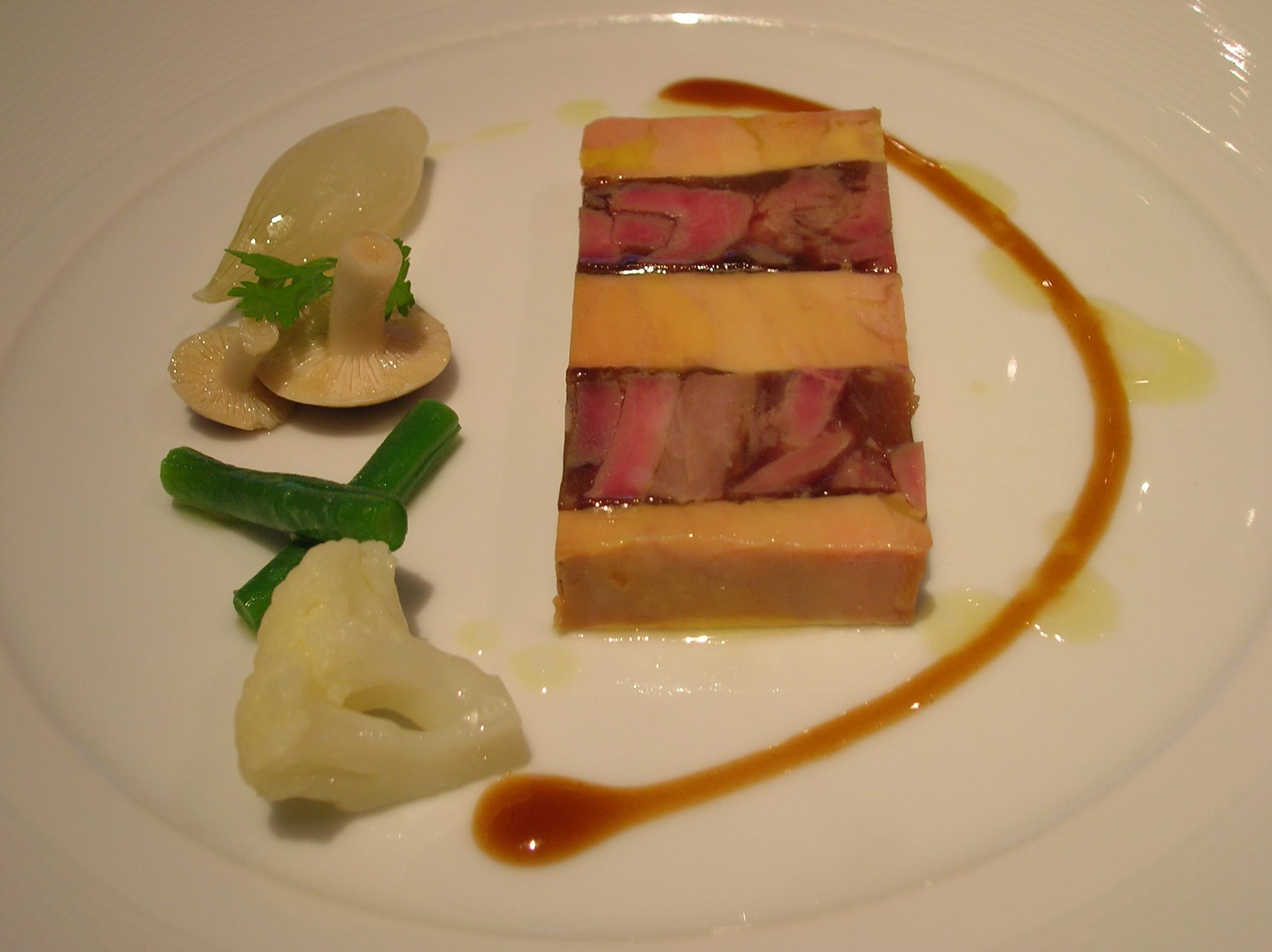 מוזאיקה של טרין פואה גרא וברווז פקין במסעדת גורדון רמזי